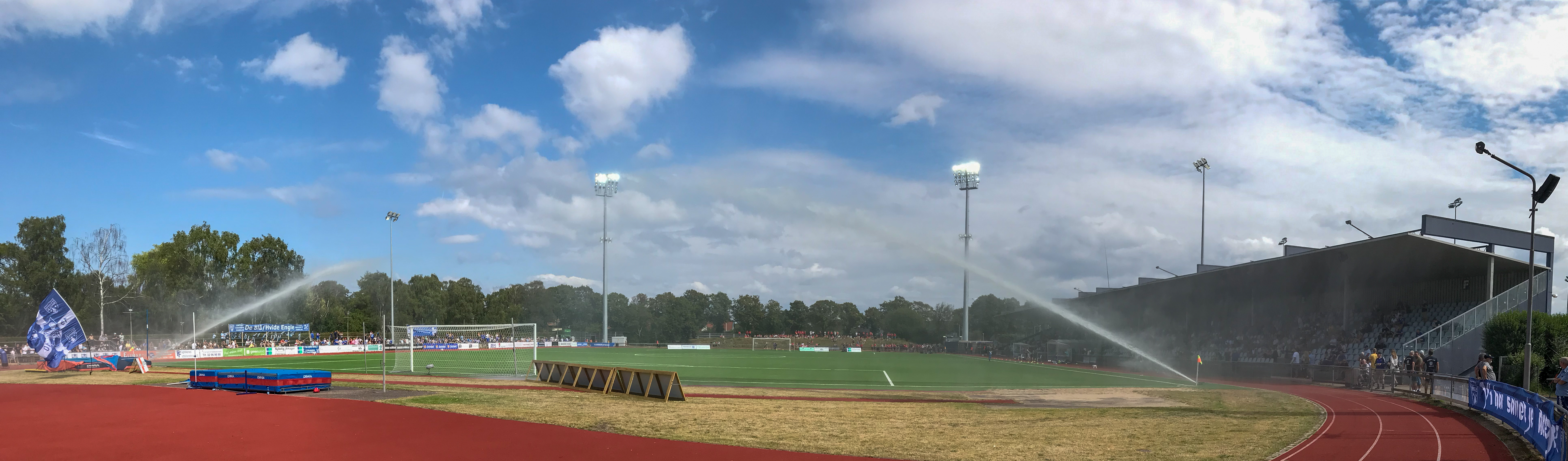 Aufnahme des Sundby Idrætspark in Kopenhagen vor der Partie Fremad Amager gegen Vejle BK der NordicBet-League am 27. Juli 2019